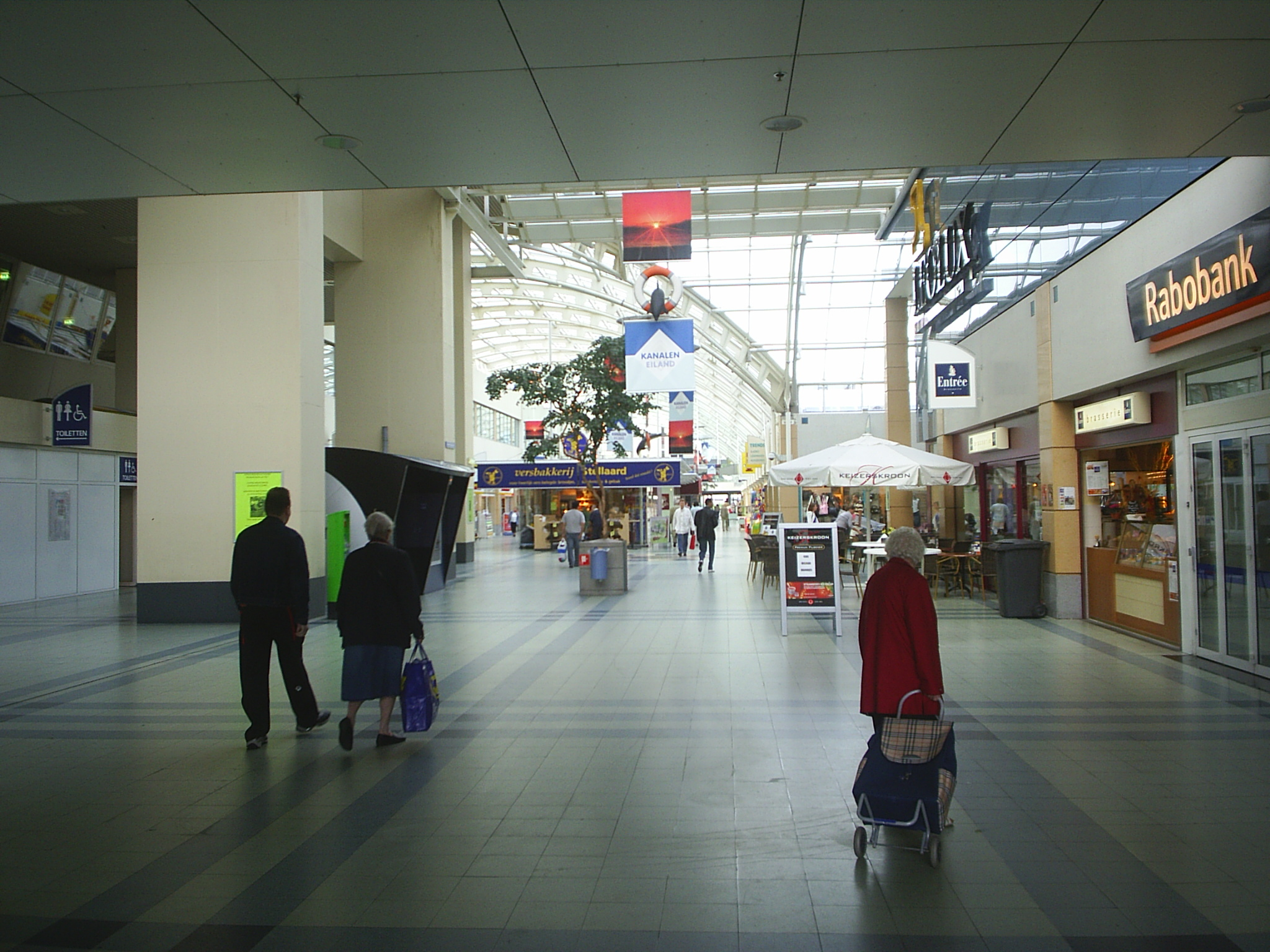 Winkelcentrum Kanaleneiland, inside